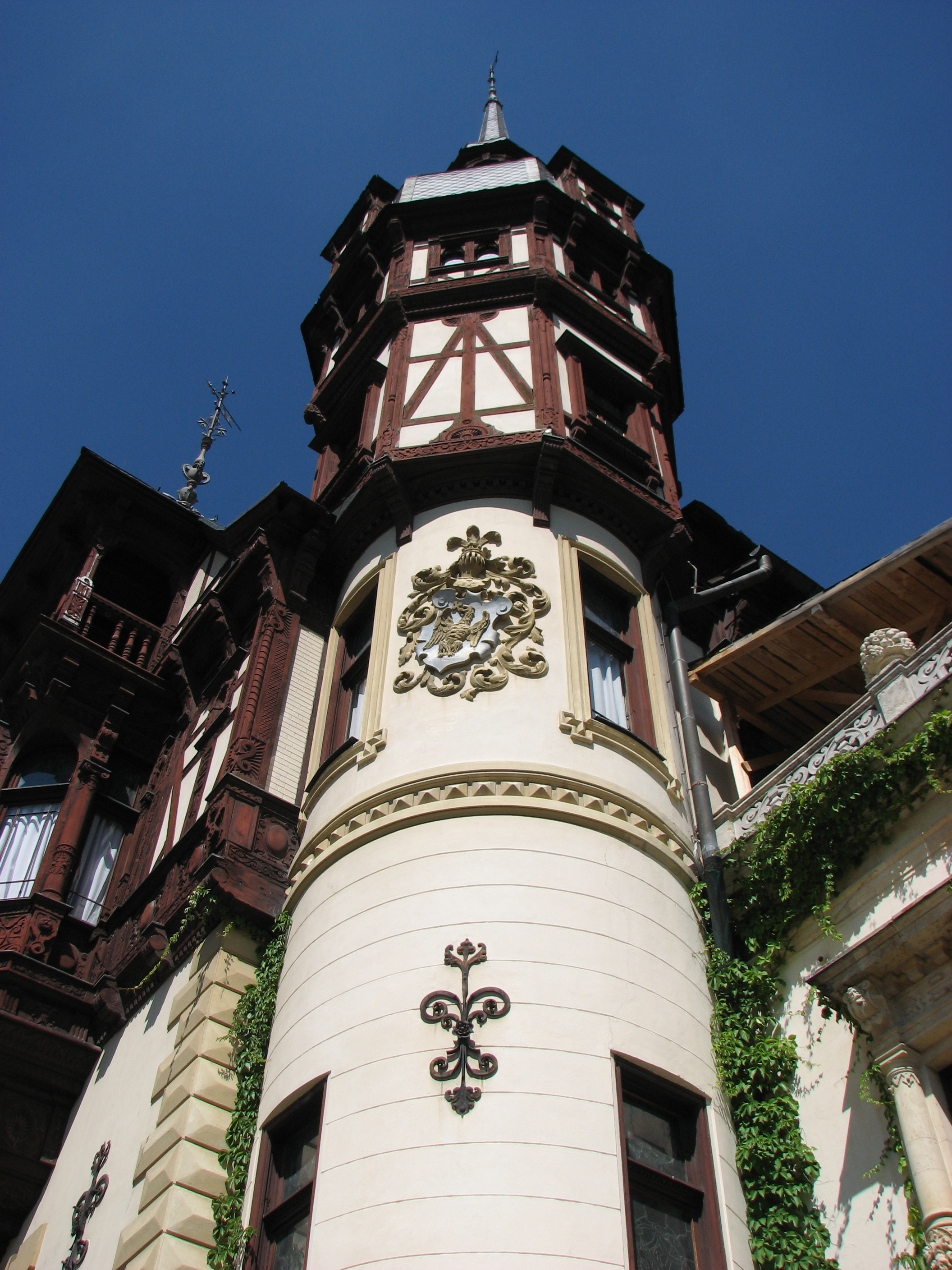 Peleş Castle